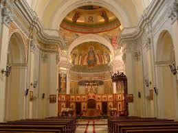 Cattedrale San Nicola di Mira